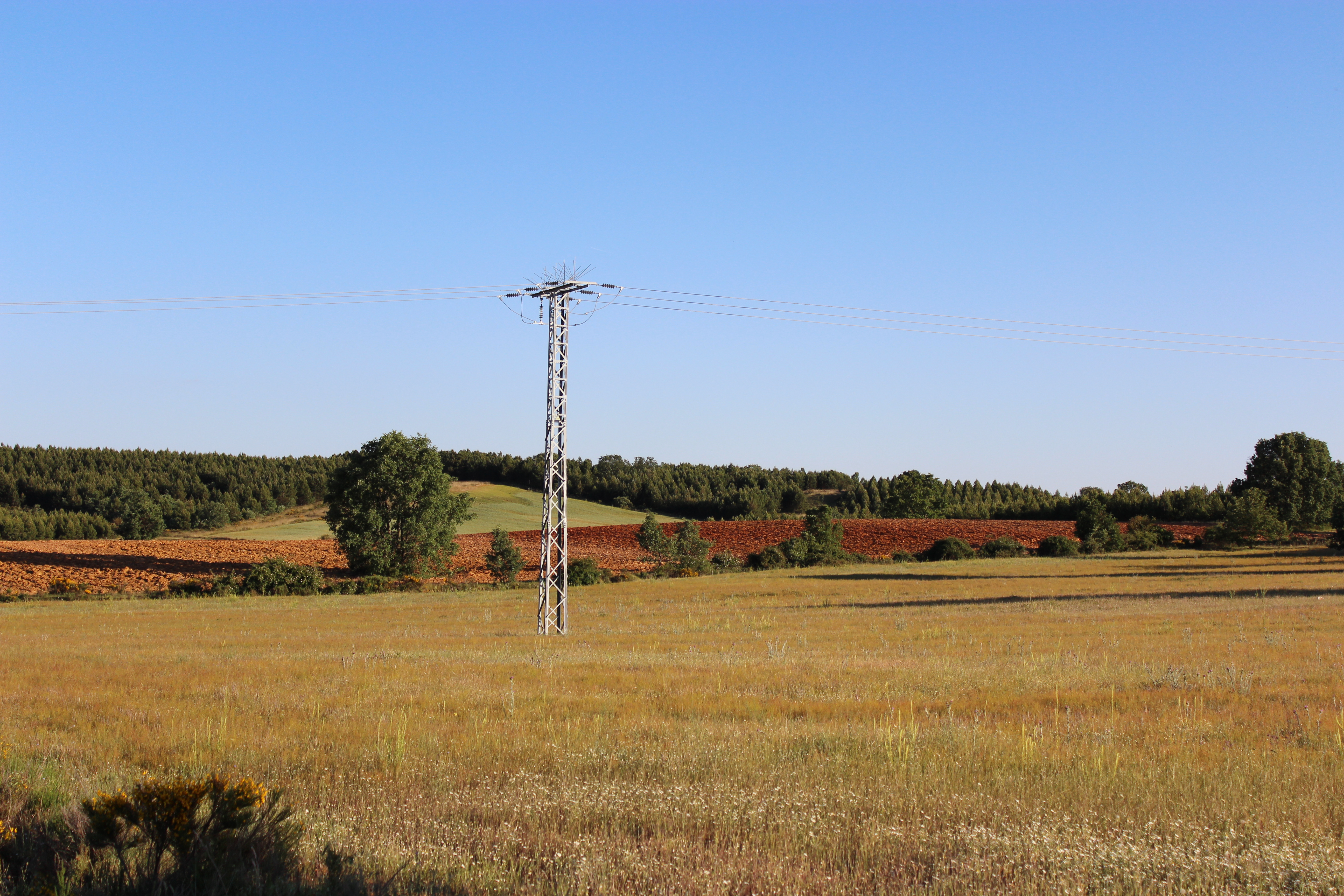 Paisaje de la Sobarriba, comarca tradicional leonesa cercana a la ciudad de León.